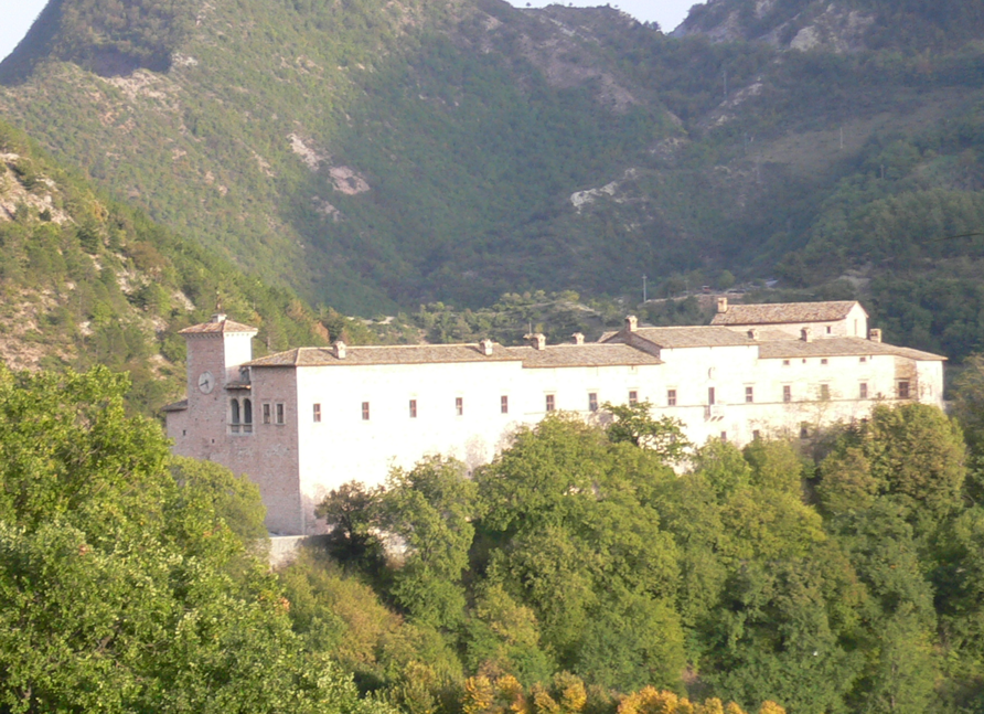 vista del palazzo Brancaleoni, Piobbico (PU)